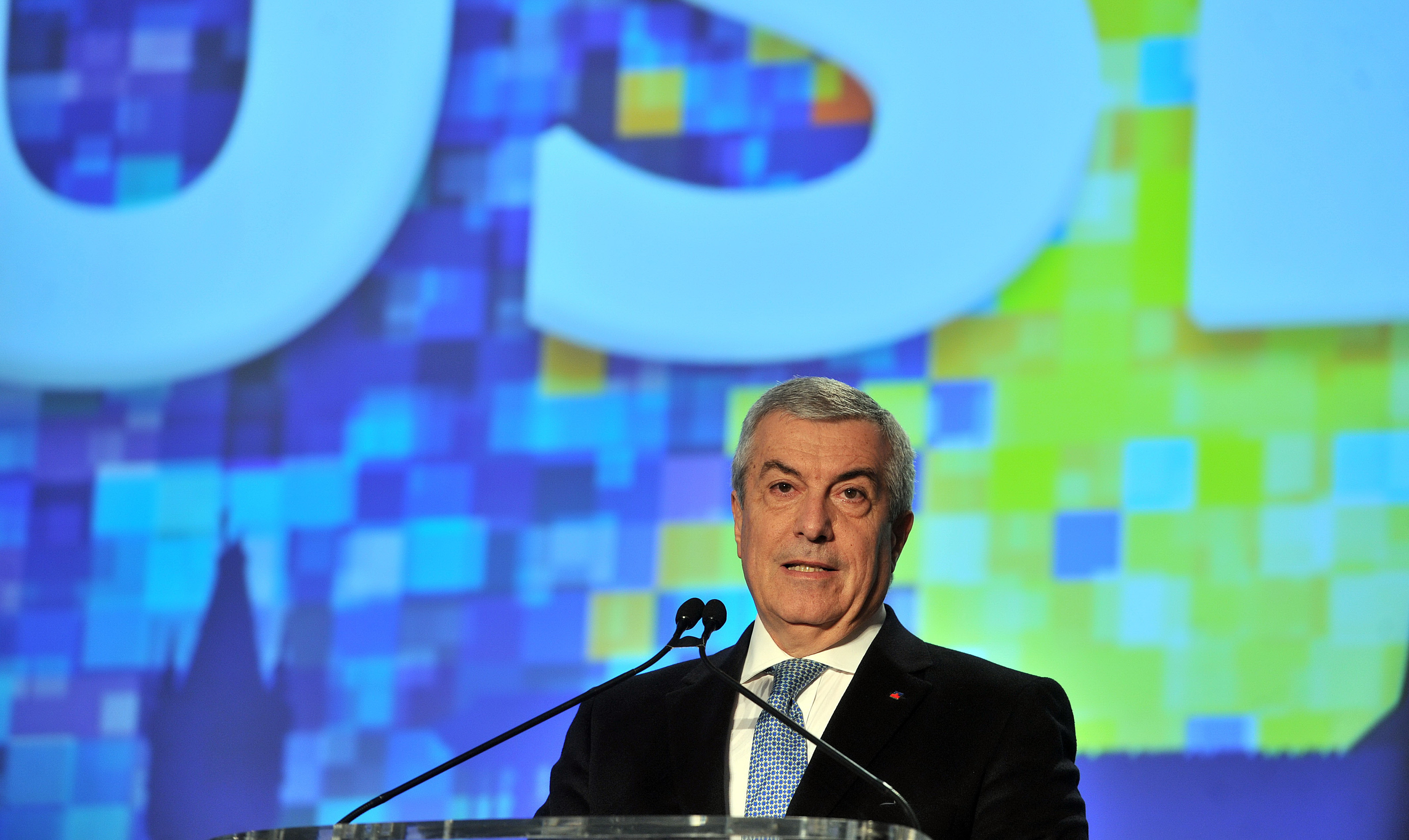 Victor Ponta la semnarea declaratiei politice privind infiintarea USL 2.0 - 14.11 (4)